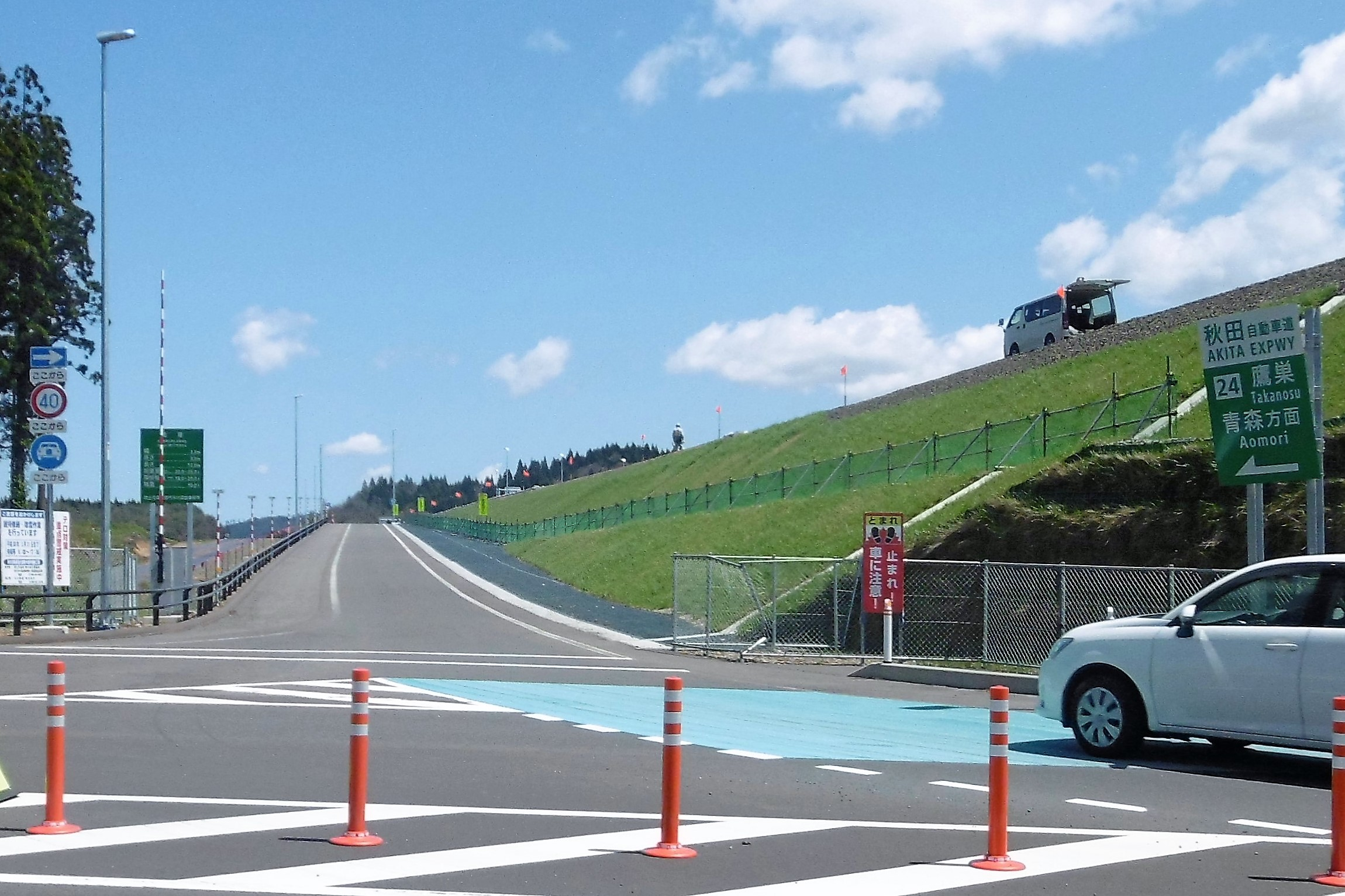 鷹巣インターチェンジ 大館方面入口 (秋田県北秋田市)